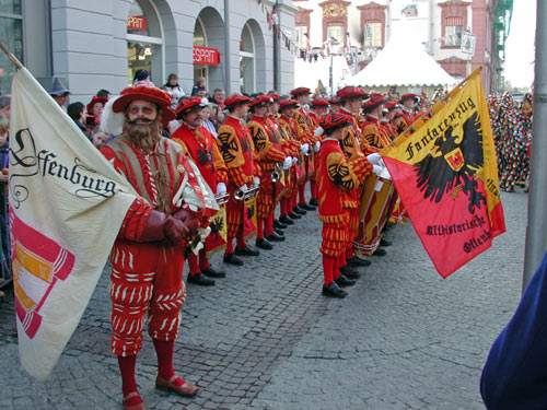 Fahnenschwinger und Fanfarenzung während der Fasentbeerdigung